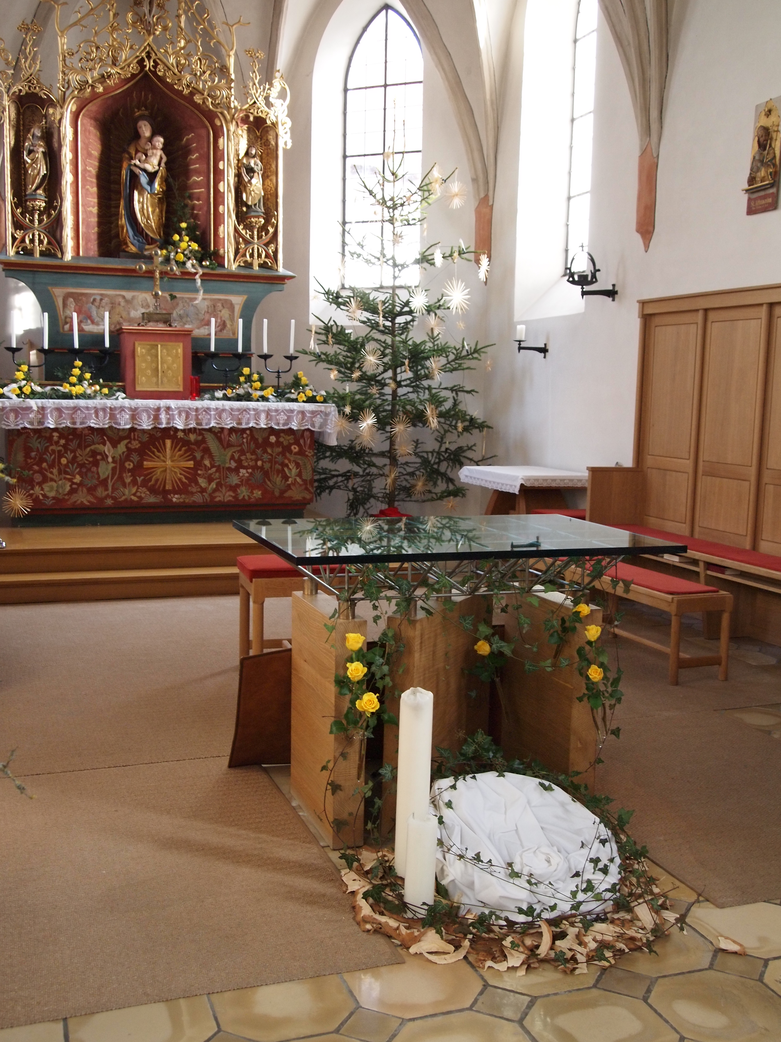 Pfarrkirche St. Thomas, Hirschzell, Volksaltar aus dem Jahr 1996 mit Weihnachtsdekoration